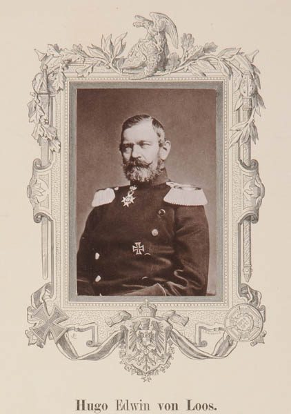 Hugo Edwin von Loos (geb. 17.3.1820 in Stettin, gest. 12.2.1883 in Berlin)